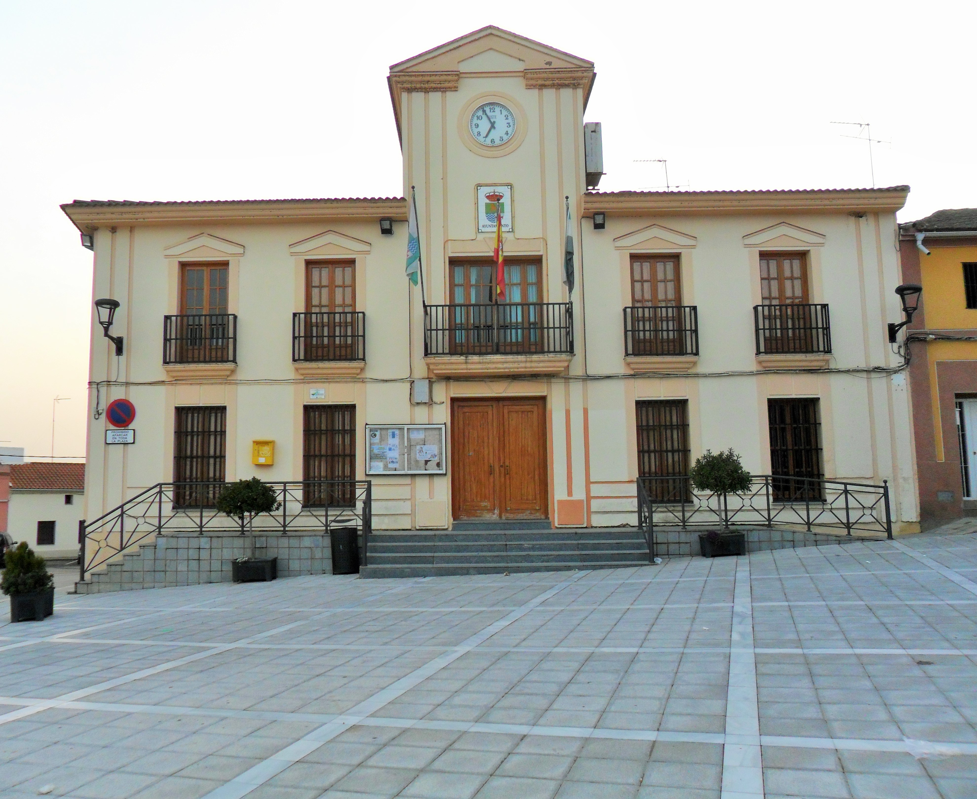 Ayuntamiento